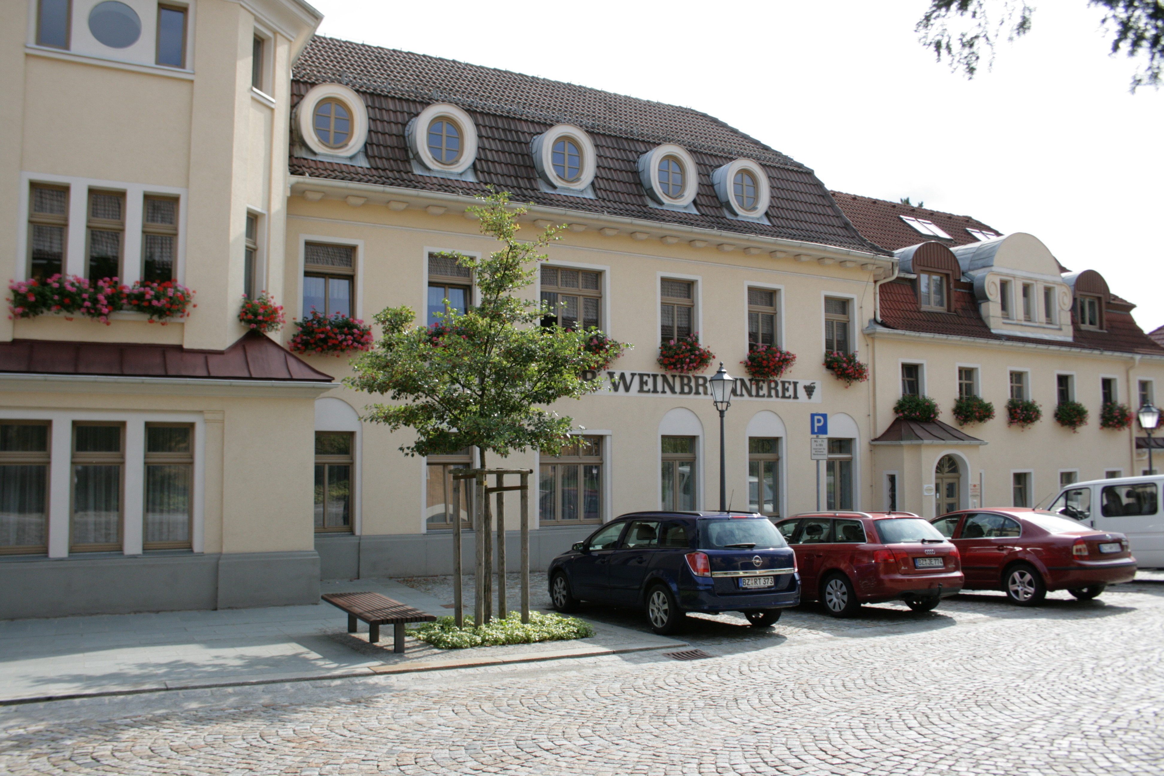 Weinbrennerei Wilthen (Hardenberg-Wilthen AG), St.-Barbara-Platz 8 in Wilthen